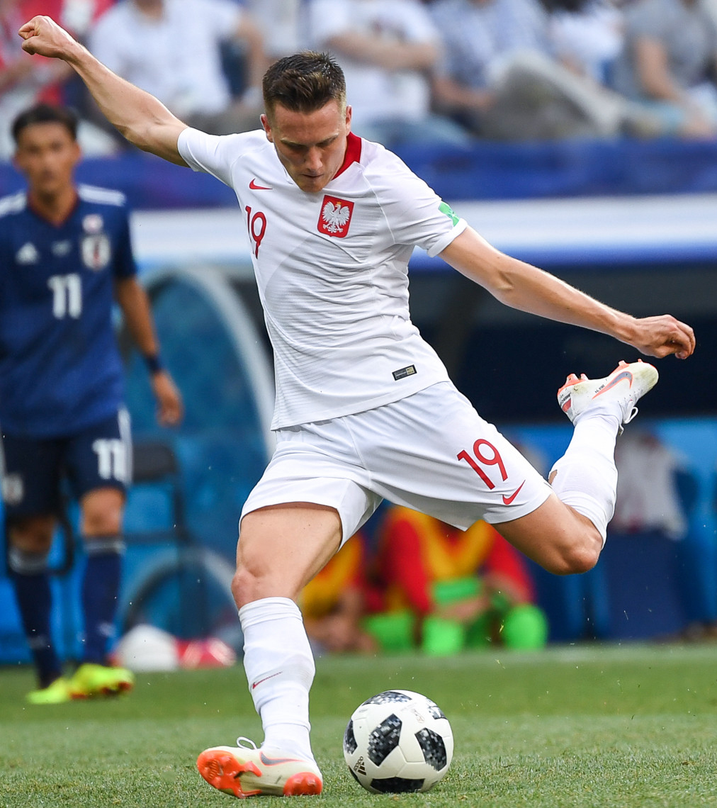 Япония проиграла Польше, но вышла в плей-офф